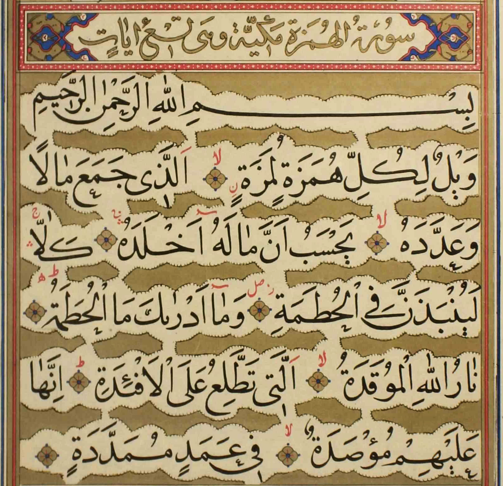 کتابت: 1117 ه.ق، اواخر دوره صفوی نگاه‌داری‌شده در کتابخانهٔ کاخ گلستان معروف به قرآن آریامهری یا پهلوی